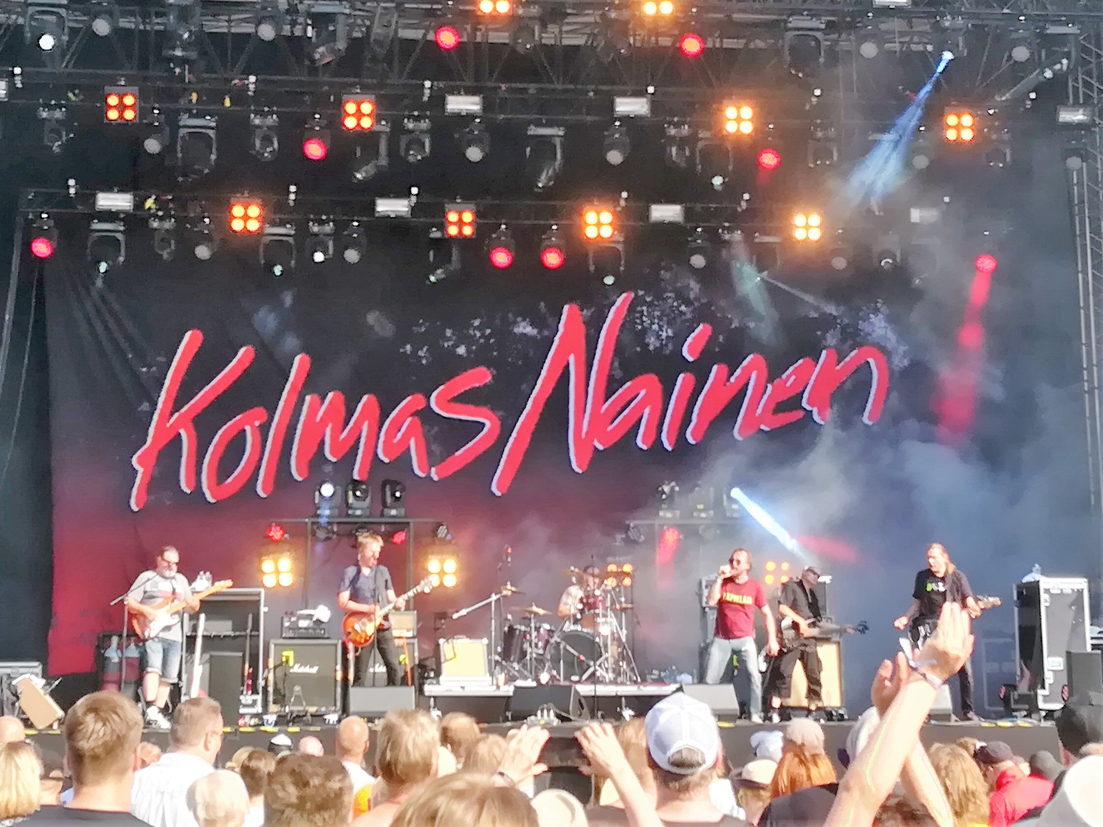 Kolmas nainen kesällä 2019